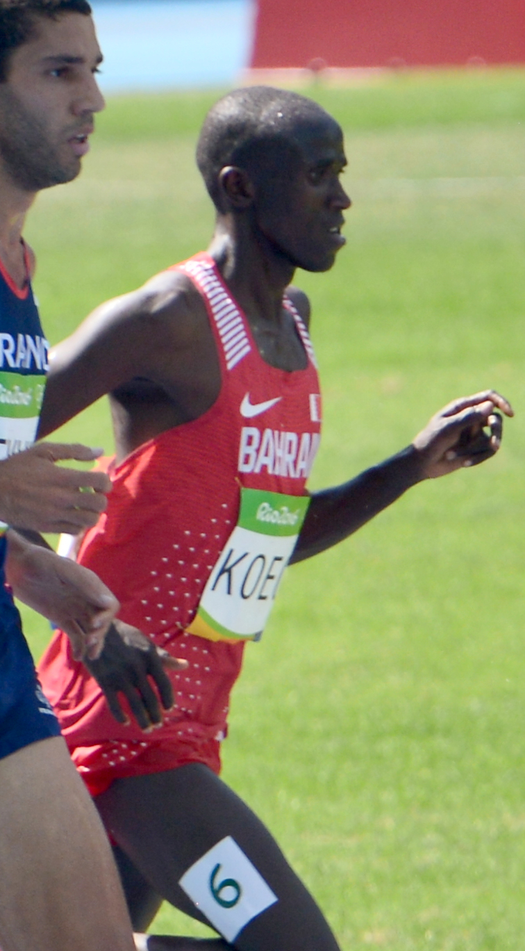 Série du 3000m steeple Homme des JO de Rio, 2016